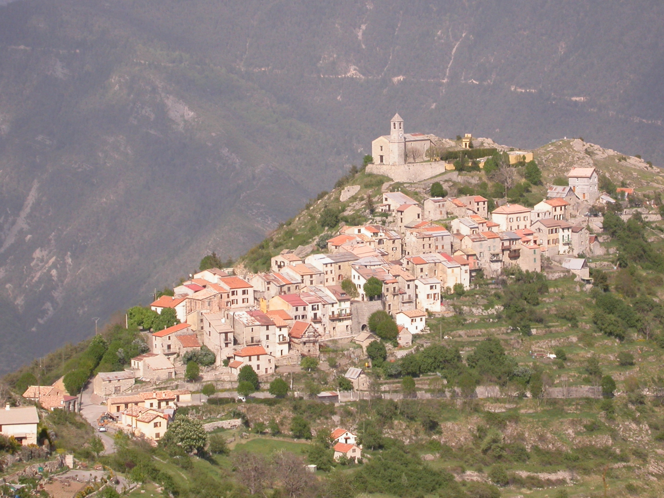 village Ilonse, Alpes-Maritimes-France